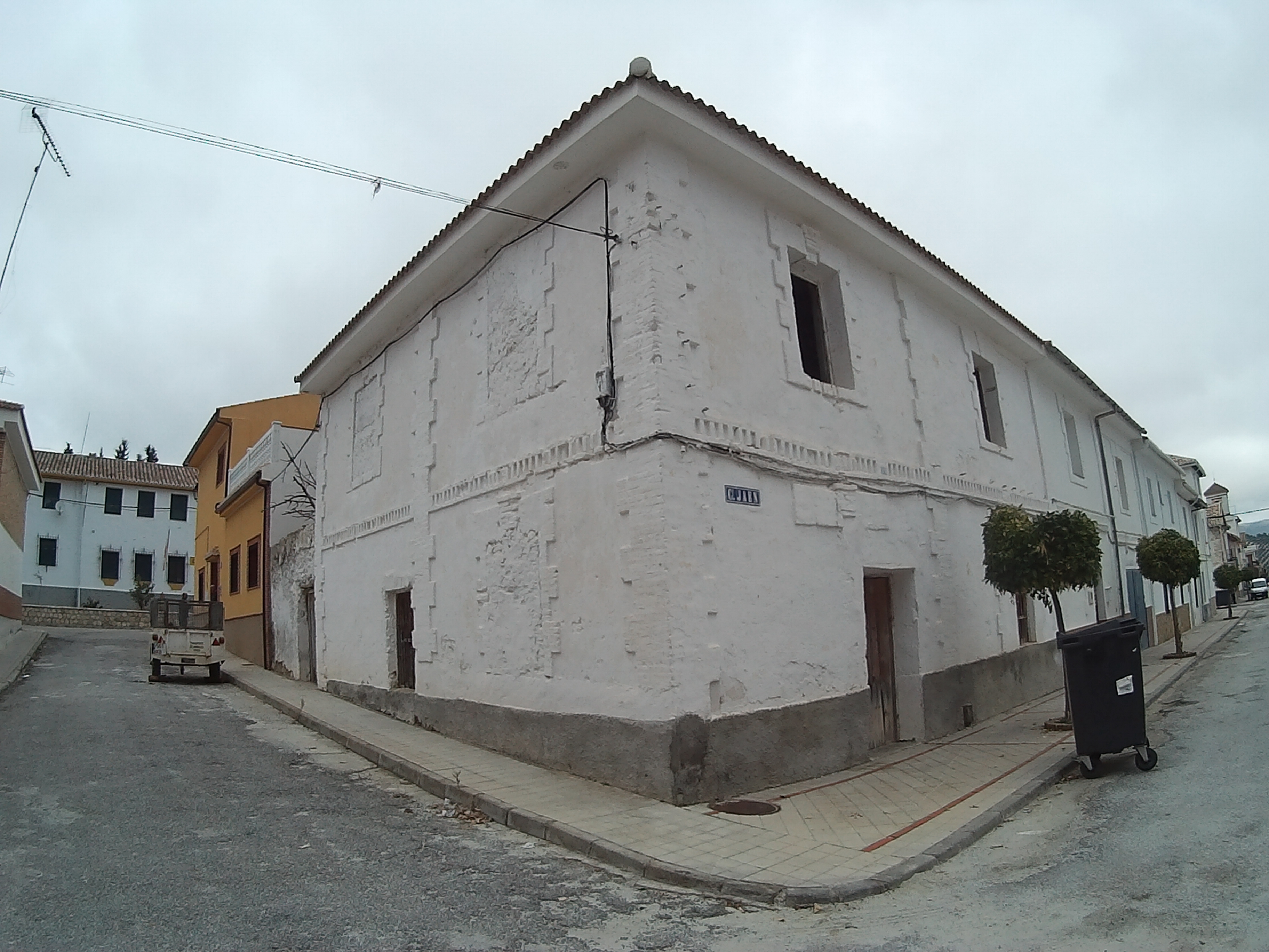 Casa diseñada por Juan Montserrat Vergés, con las que se reconstruyó el pueblo después del terremoto de 1884